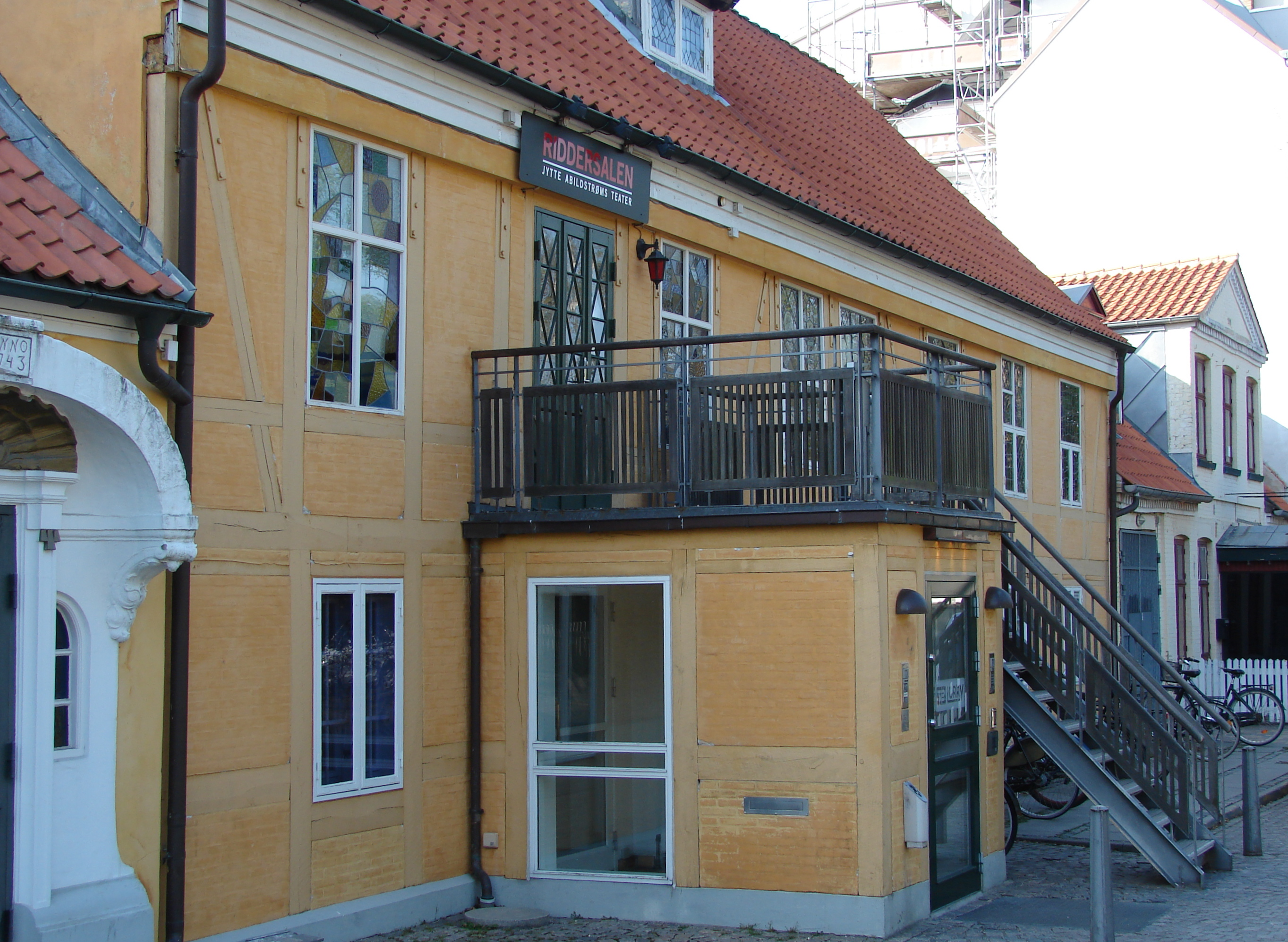 Riddersalen på Frederiksberg, København